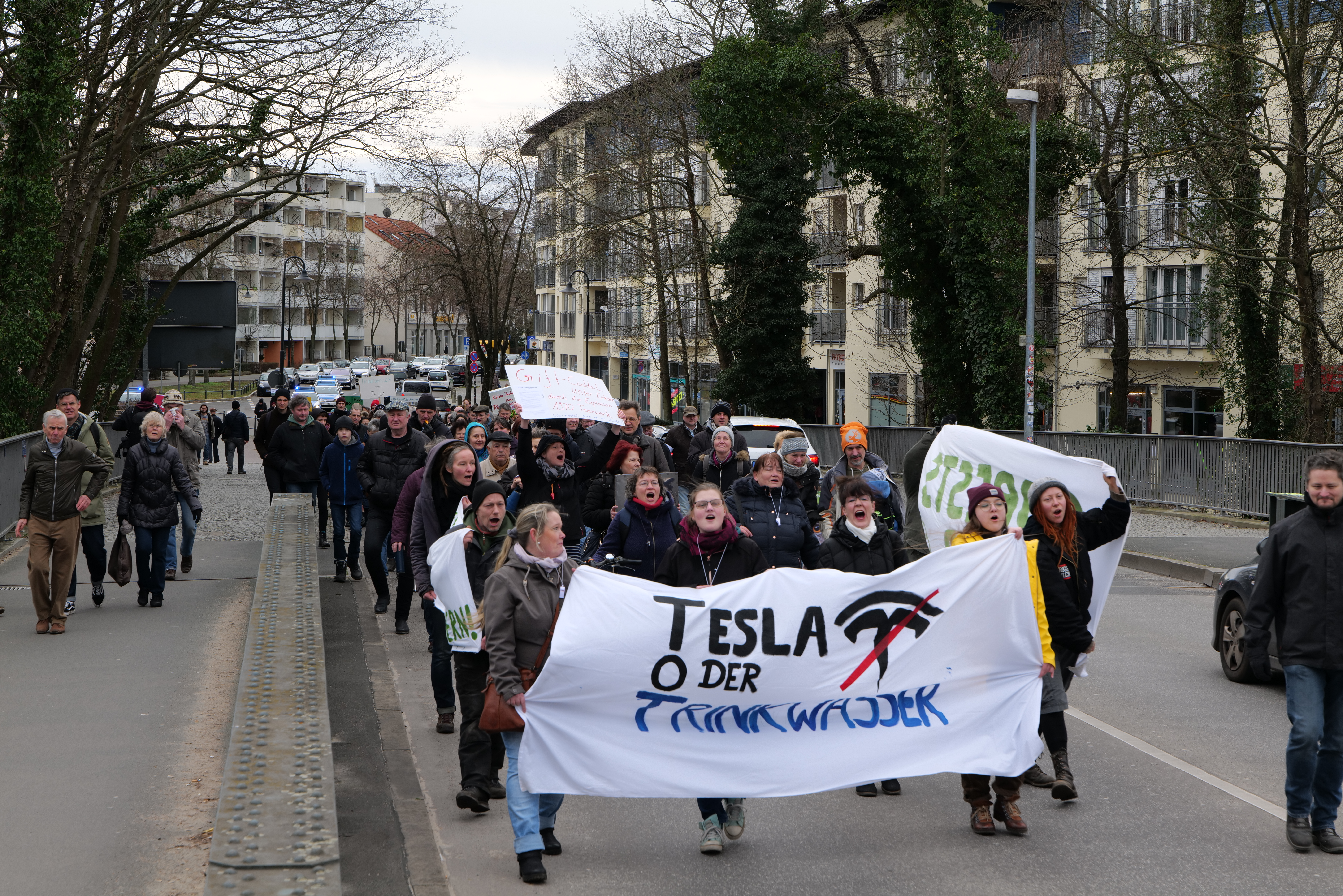 Demonstration gegen die Tesla Gigafactory Grünheide am 22. Februar 2020 in Erkner.